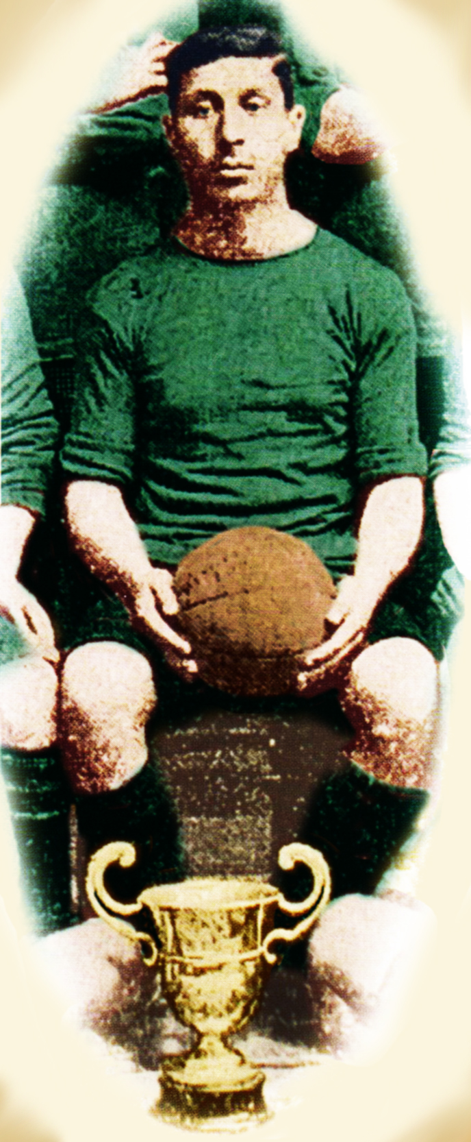 Ο Γιώργος Καλαφάτης